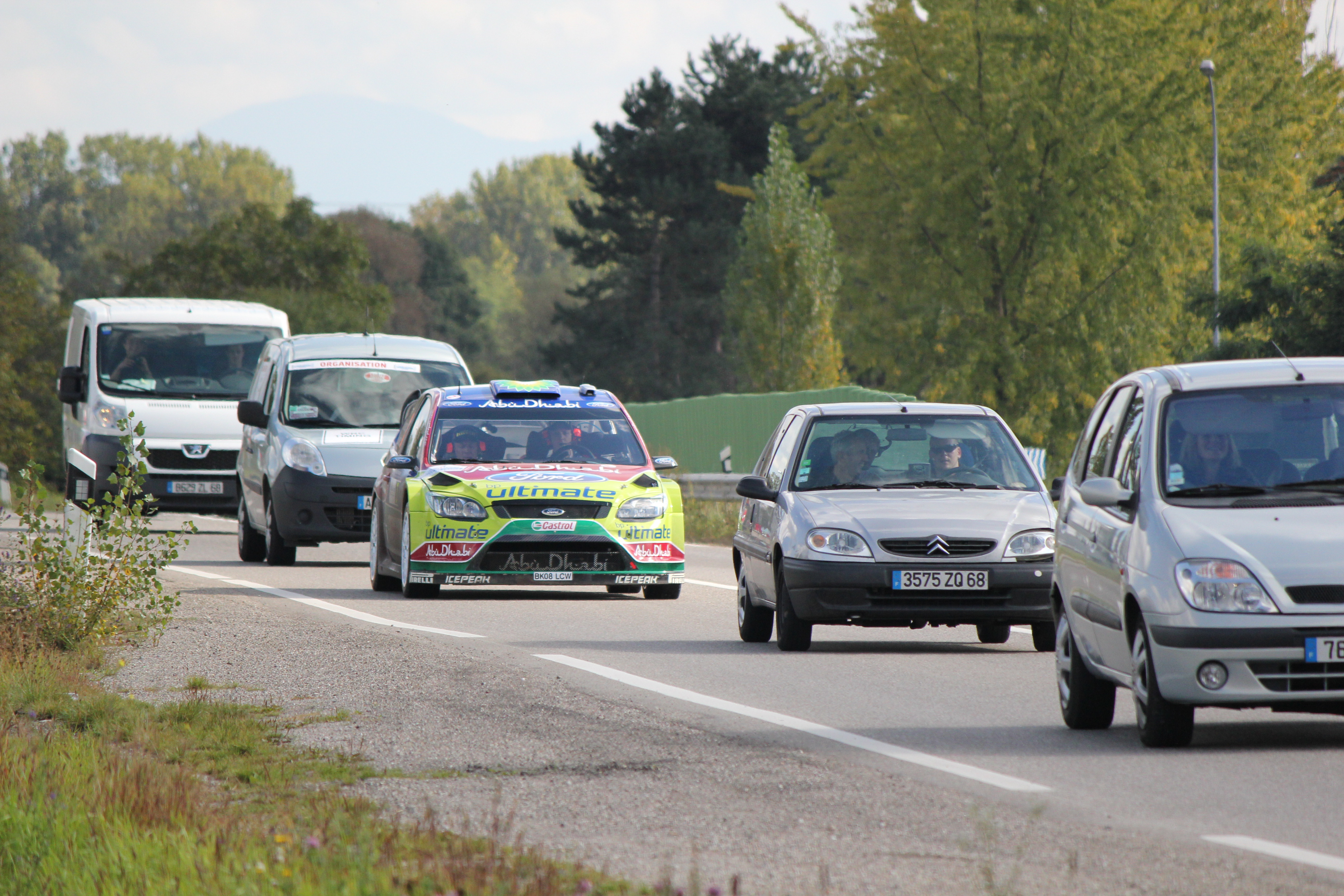 Présence d'un véhicule Ford WRC sur le parcours ouvert au public, lors du rallye de France Alsace au Championnat du monde des rallyes 2010.